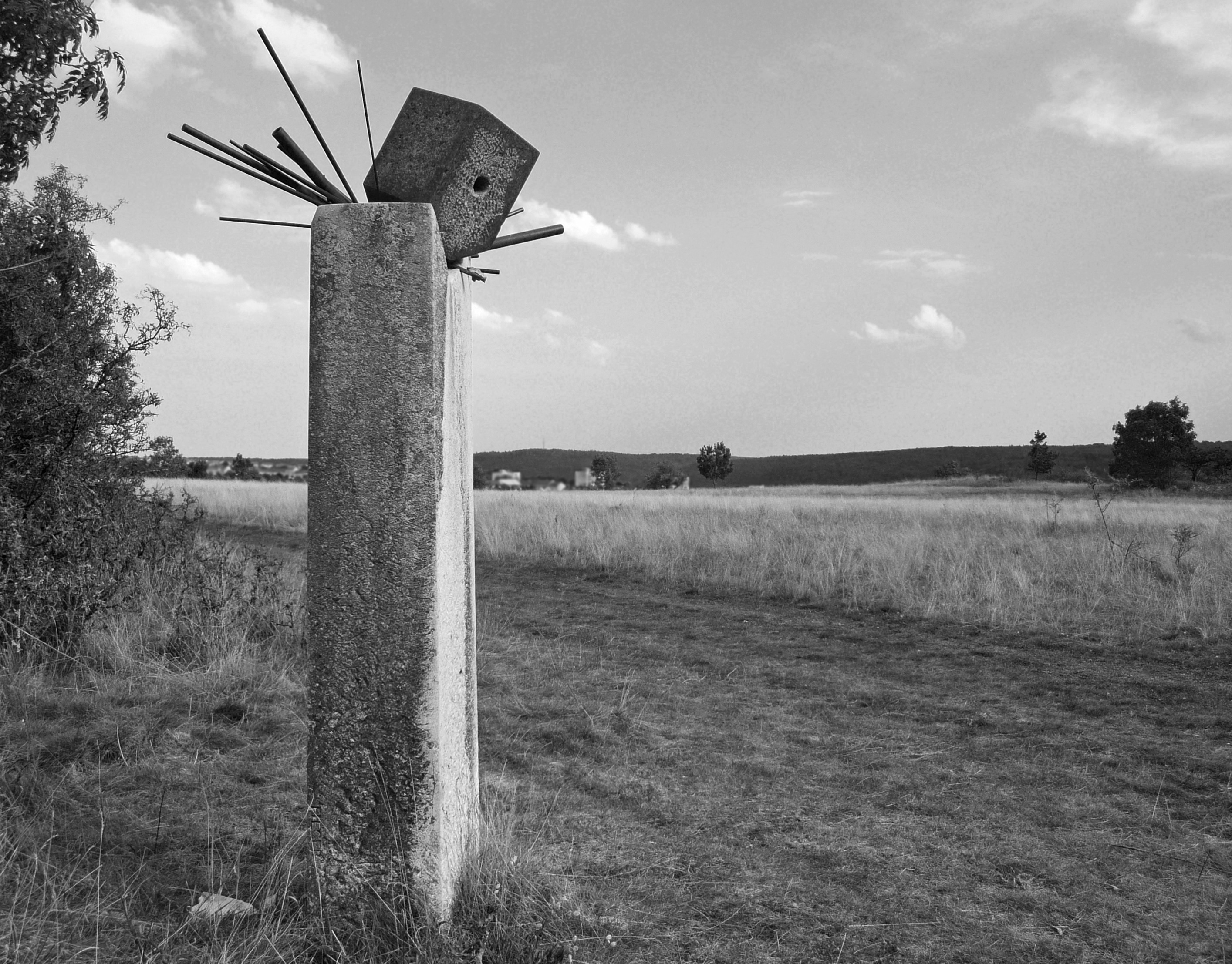 Stele des Eichstätter Bildhauers Rupert Fieger für die Opfer der Hexenverfolgung im Hochstift Eichstätt an der Hinrichtungsstätte auf dem Hochgericht am ehemaligen Galgenberg, errichtet 2001. Material: Jurakalkstein, Granit, Metallrohre. Ansicht von Nordwesten. Inschrift: “Zum Gedenken an die unschuldigen Opfer der Hexenverfolgung im 15., 16., 17. und 18. Jahrhundert.”